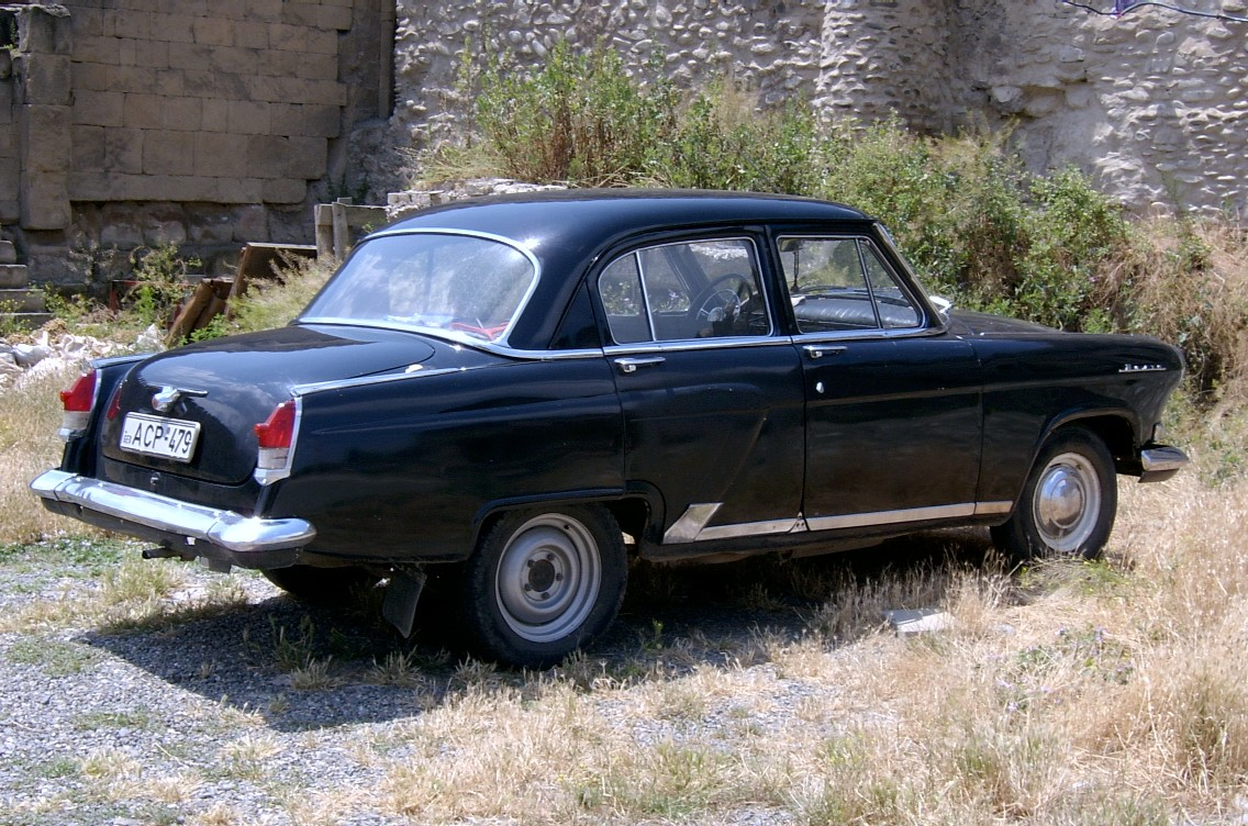 GAZ Wolga 21 (russ. Automarke)